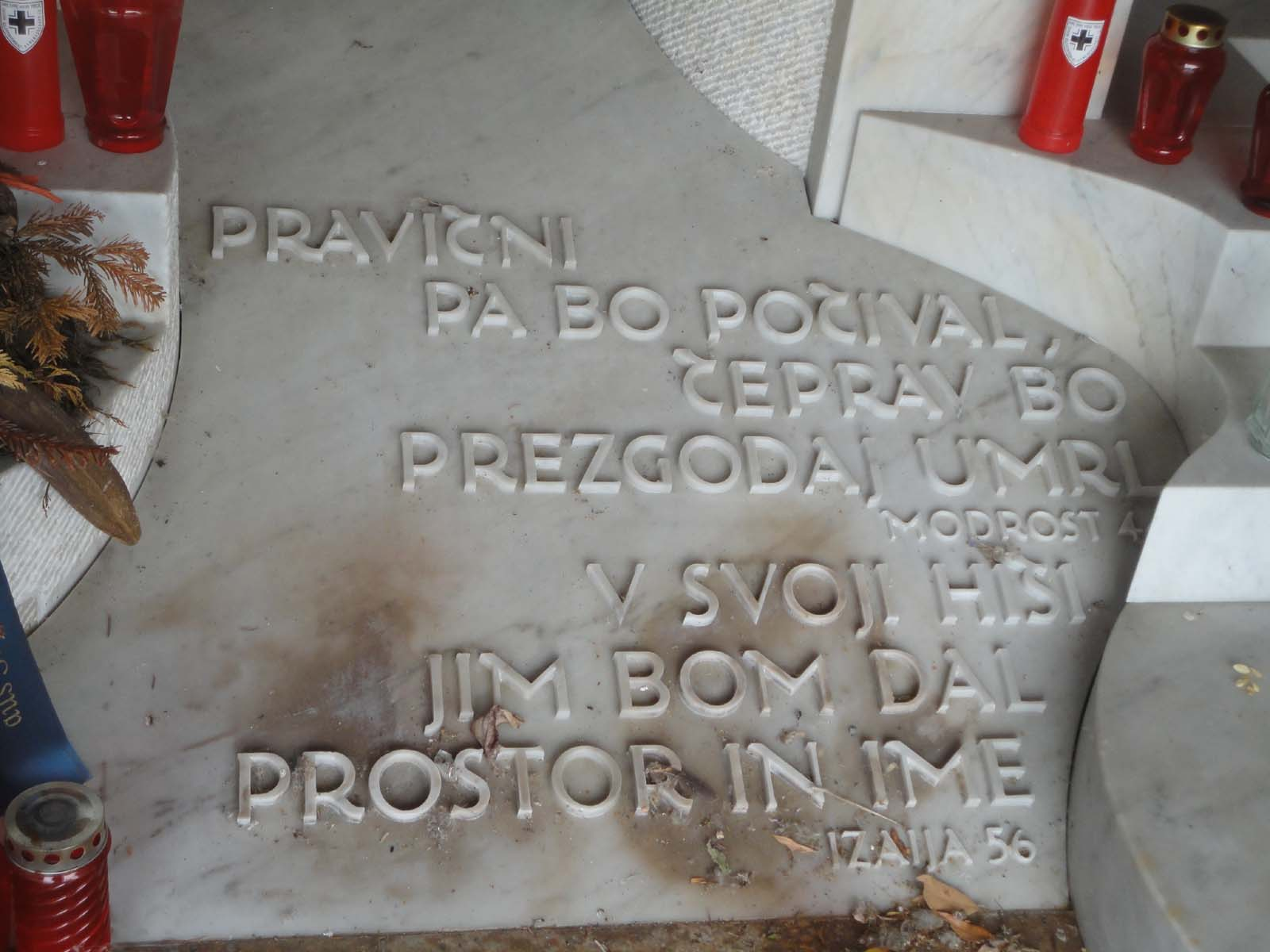 Napis pod spomenikom v spominskem parku Teharje, v bivšem taborišču na Teharjah